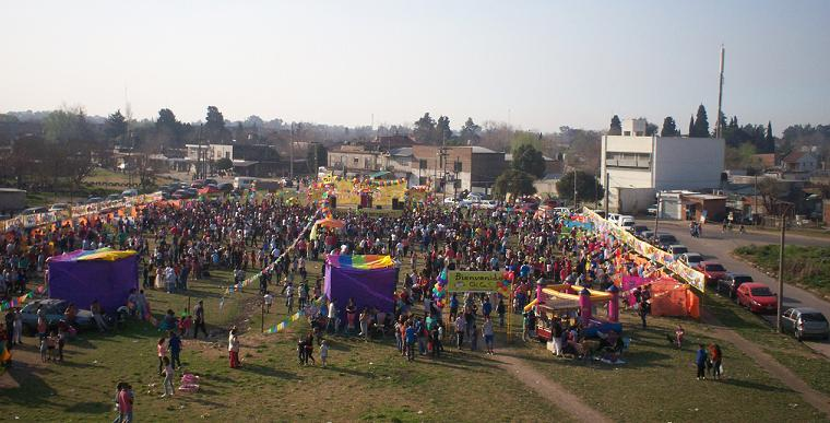 Imagen aera del Feestival del Dia del Niño en Don Orione 2014